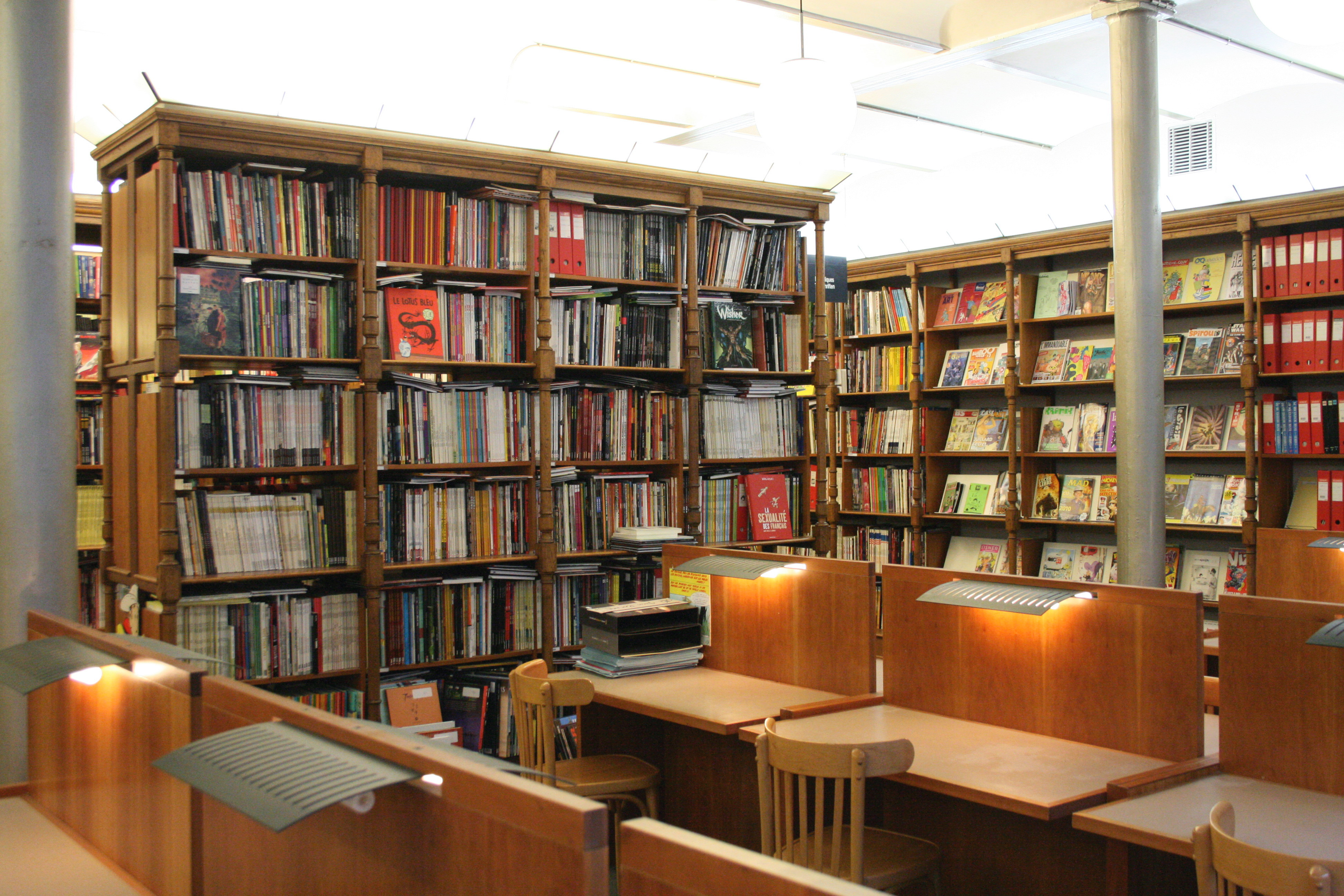 Rue des Sables 20, Bruxelles (Belgique). Centre belge de la bande dessinée : bibliothèque